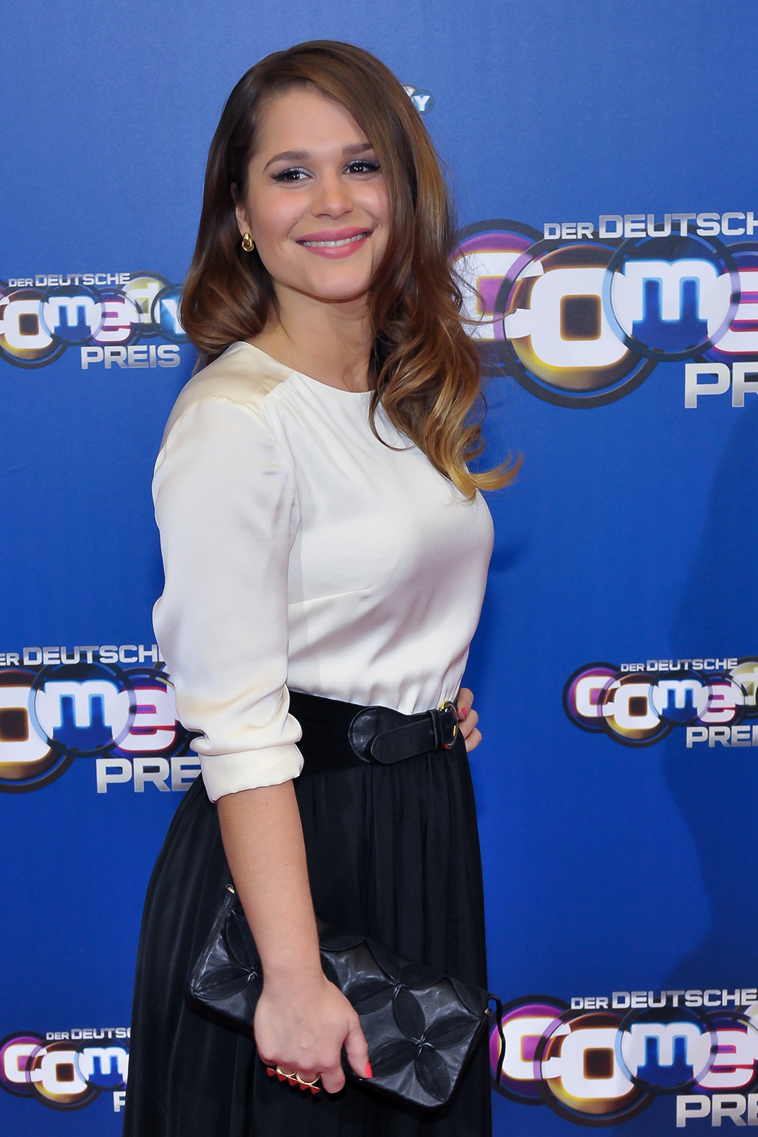 Cristina do Rego auf dem Deutschen Comedypreis in Köln am 15. Oktiober 2013.